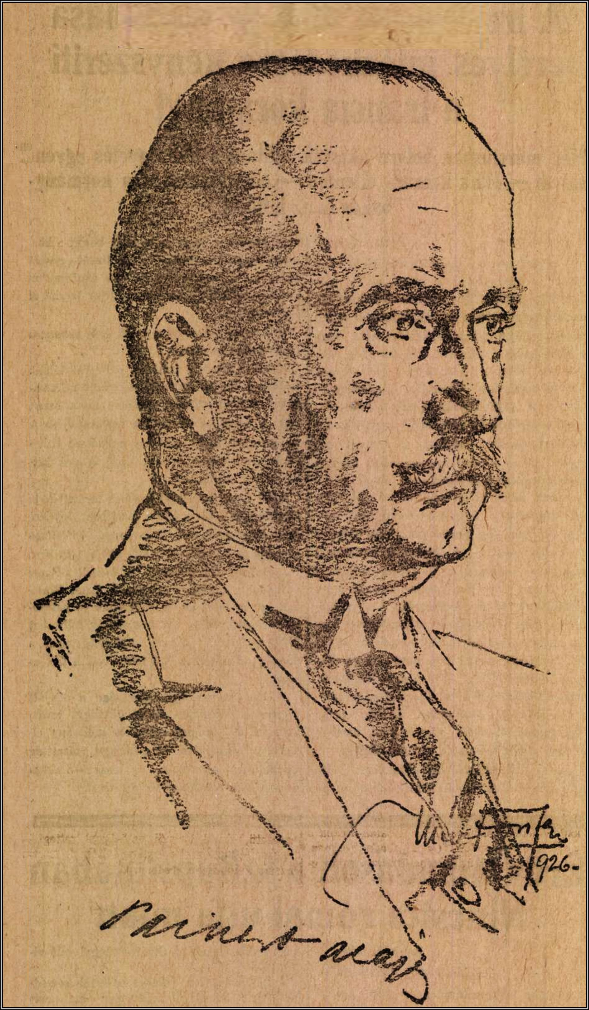 Seprősi ifj. Paikert Alajos, (Nagyszombat, 1866. május 31. – Budapest, 1948. július 30.) mezőgazdász, jogász, múzeumigazgatóról Márton Ferenc által készített grafika